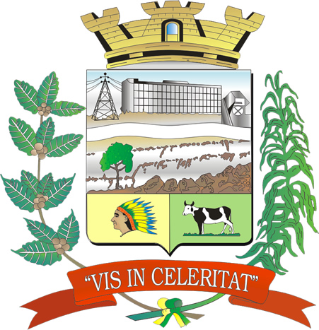 Bandeira do município de Salto Grande - SP - Brasil. O Brasão de Armas do município foi promulgado sob a Lei nº 117, de 09/09/1958